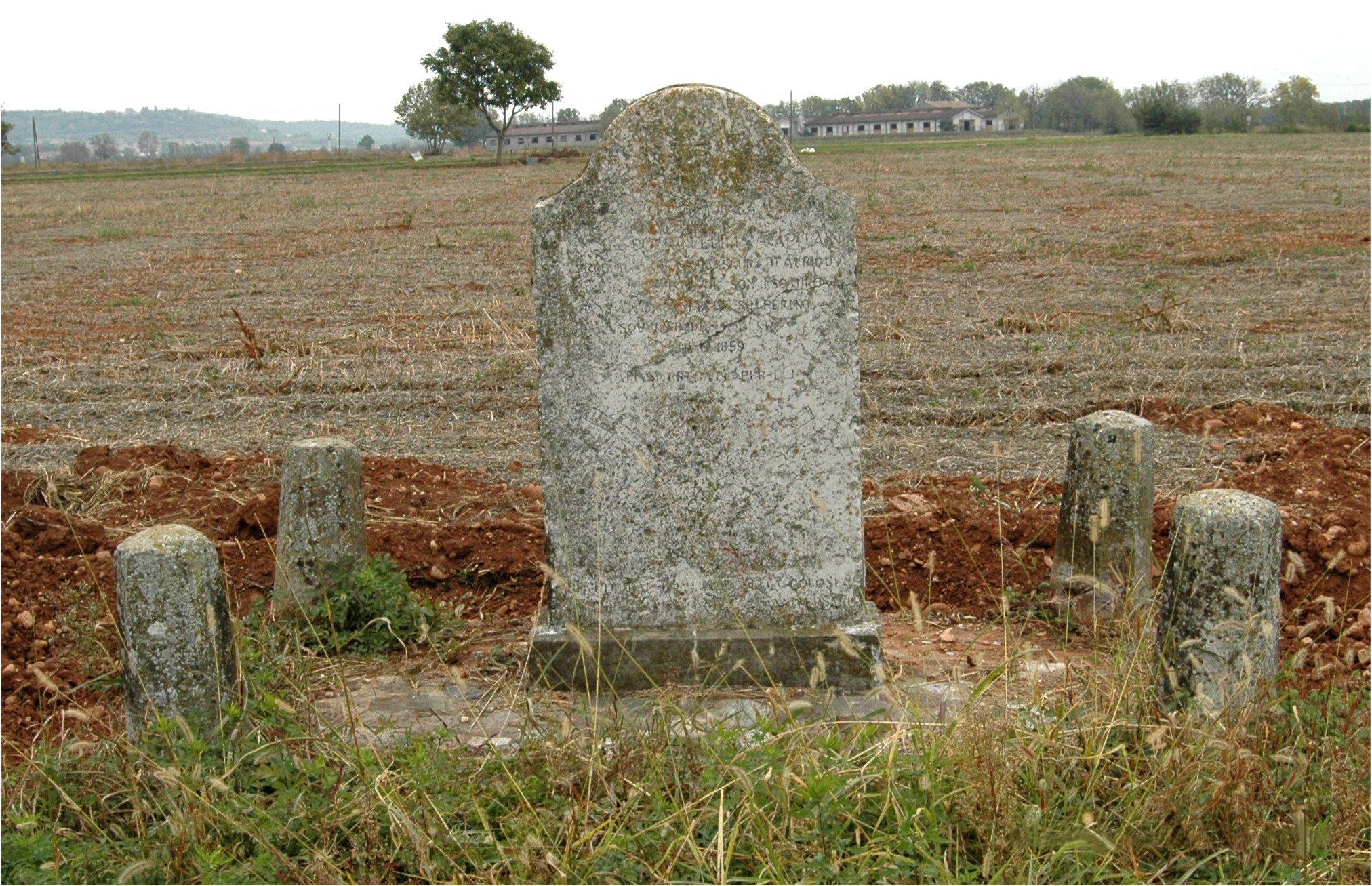 Cenotafio Roquefeuille. Località Valle del Termine, Guidizzolo, coordinate geografiche 45.331549 , 10.568665